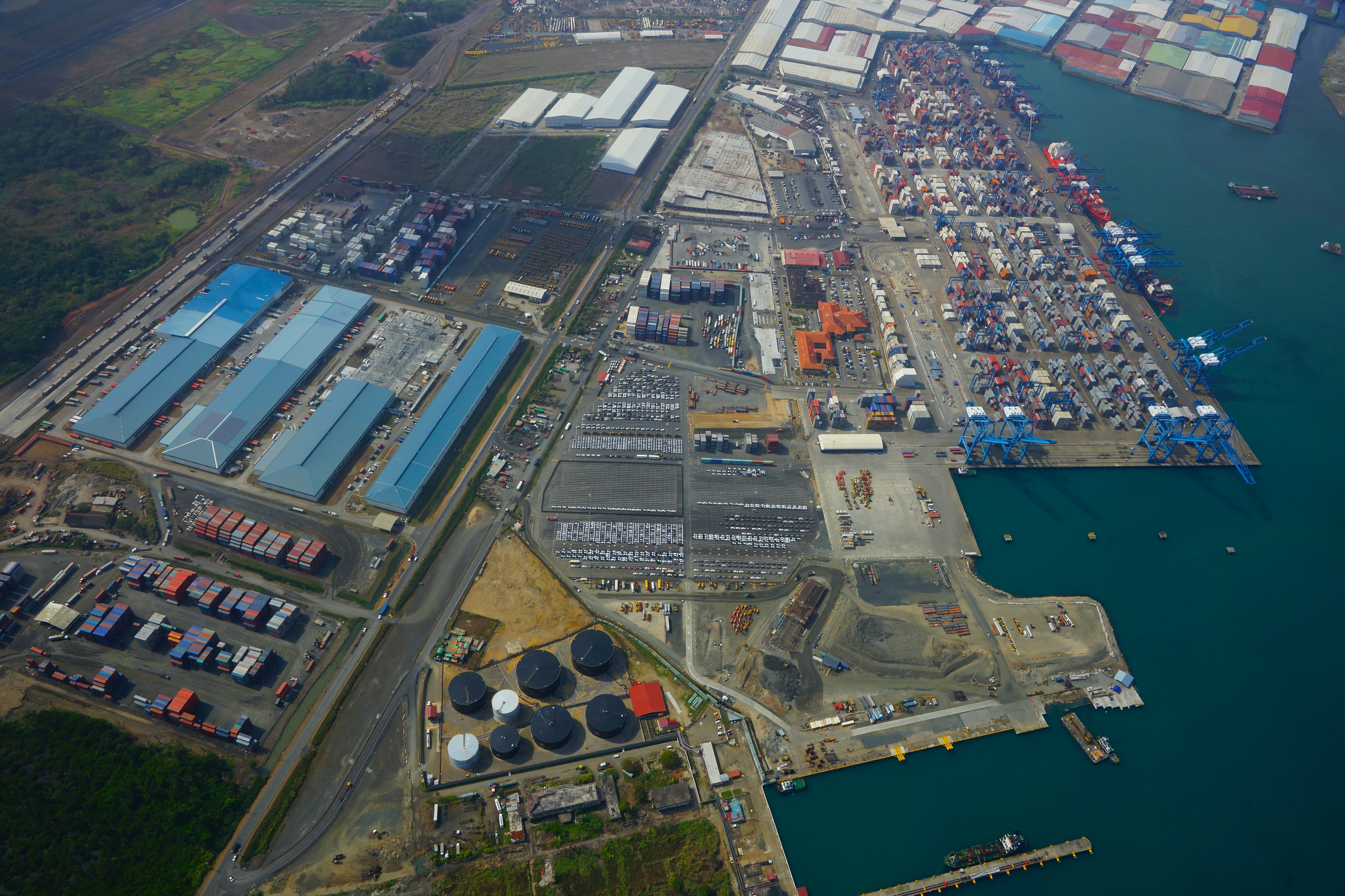 Zona Libre de Colón - Colón Free Trade Zone